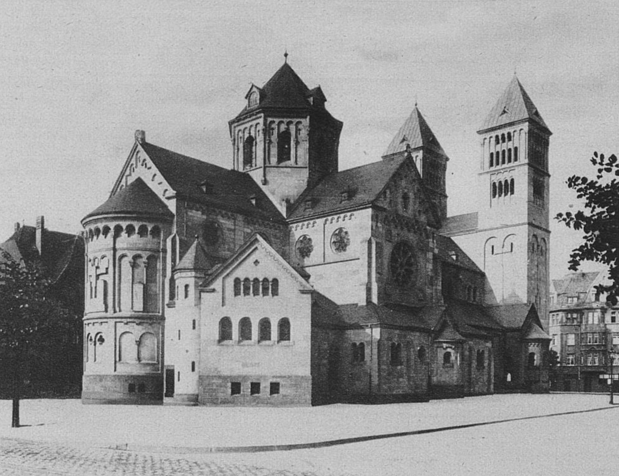 Die jetzt im Aeußern vollendete Adolfus-Kirche an der Kaiserswerther Straße in Düsseldorf von der Fischerstraße aus gesehen. Erbaut ist die Kirche vom Kgl. Baurat Kaspar Pickel, Düsseldorf. (1914)